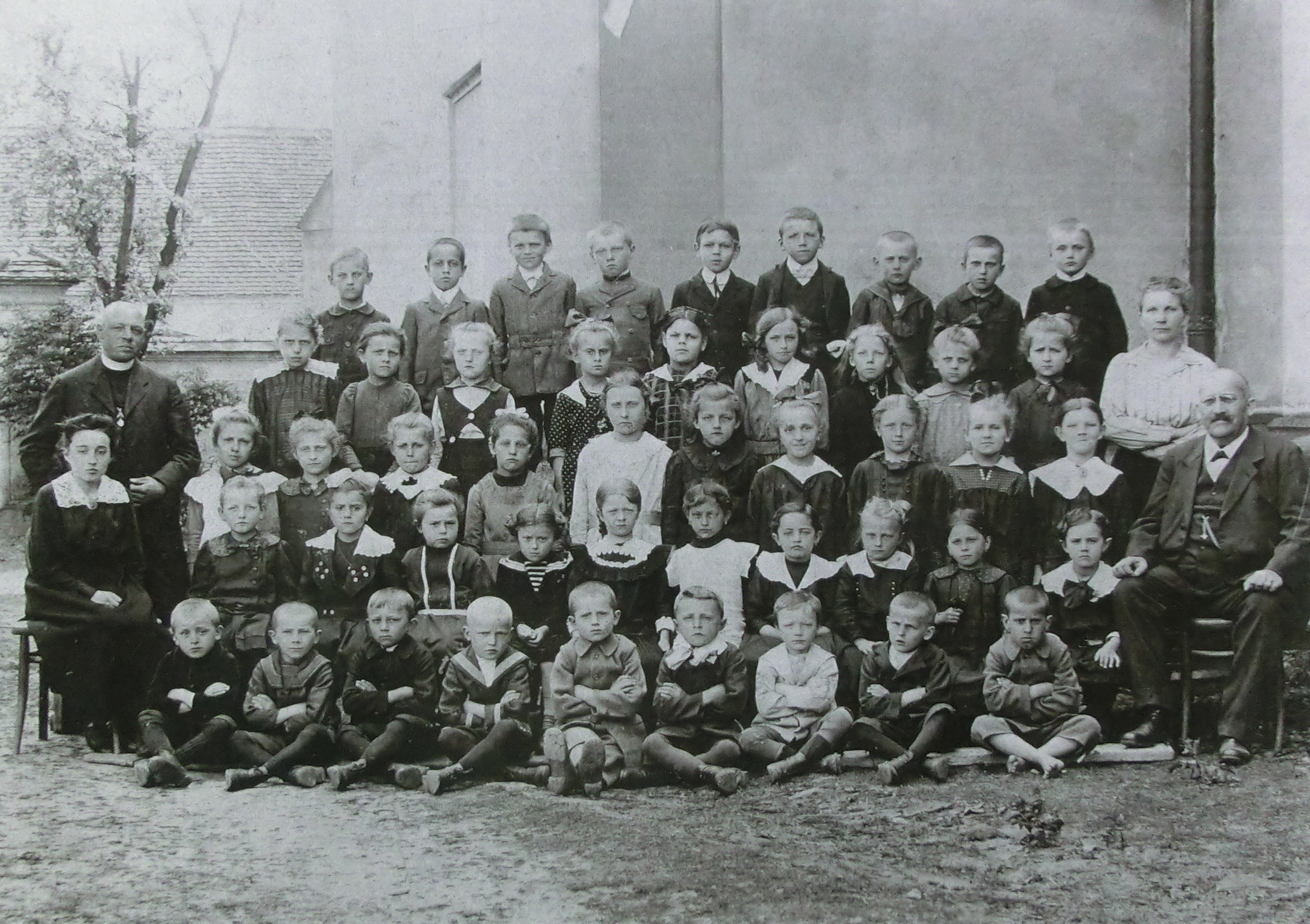 1917-1918 Škola Libochovany, farář Jos. Vítek